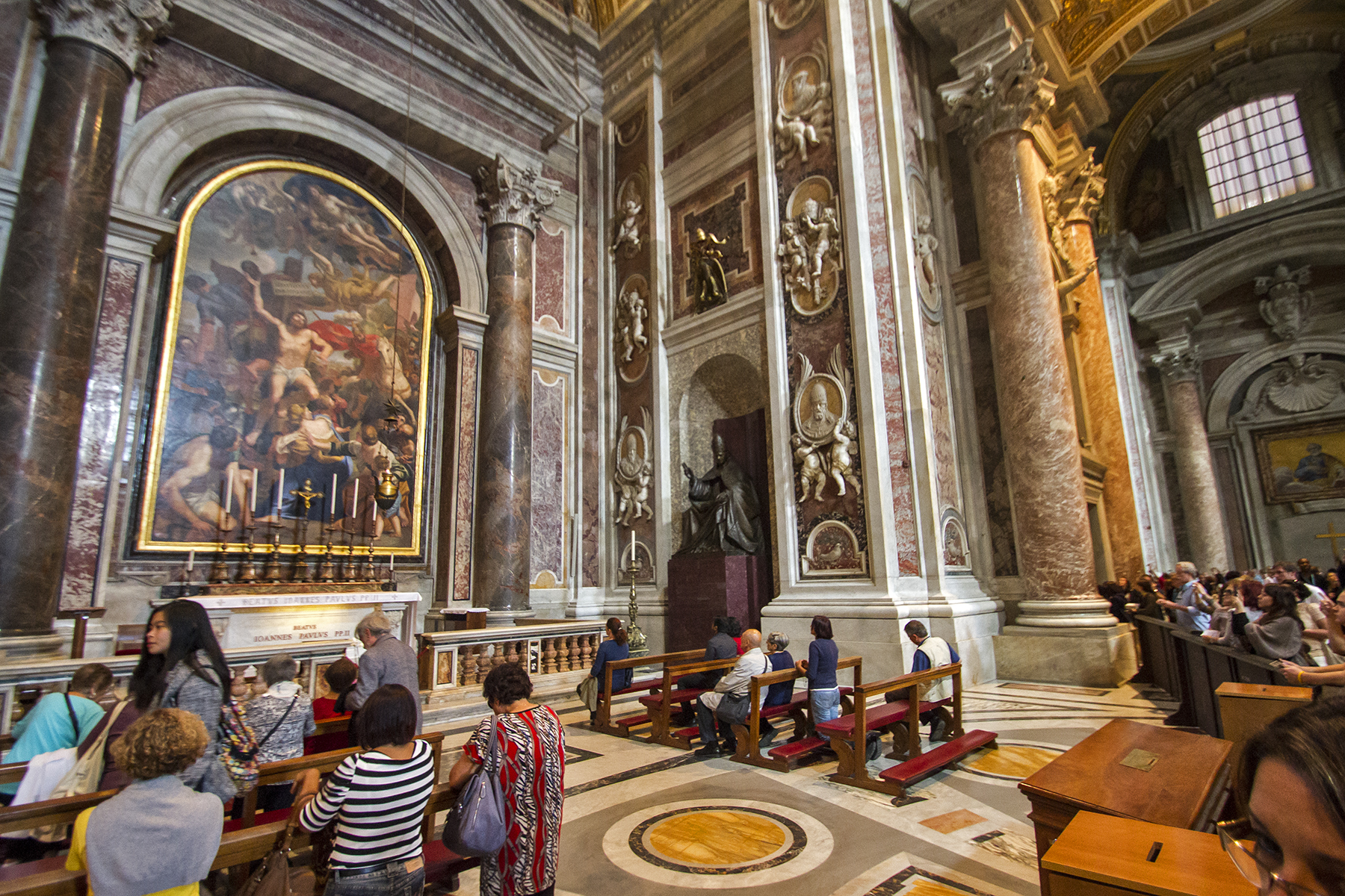 Vatican 5533